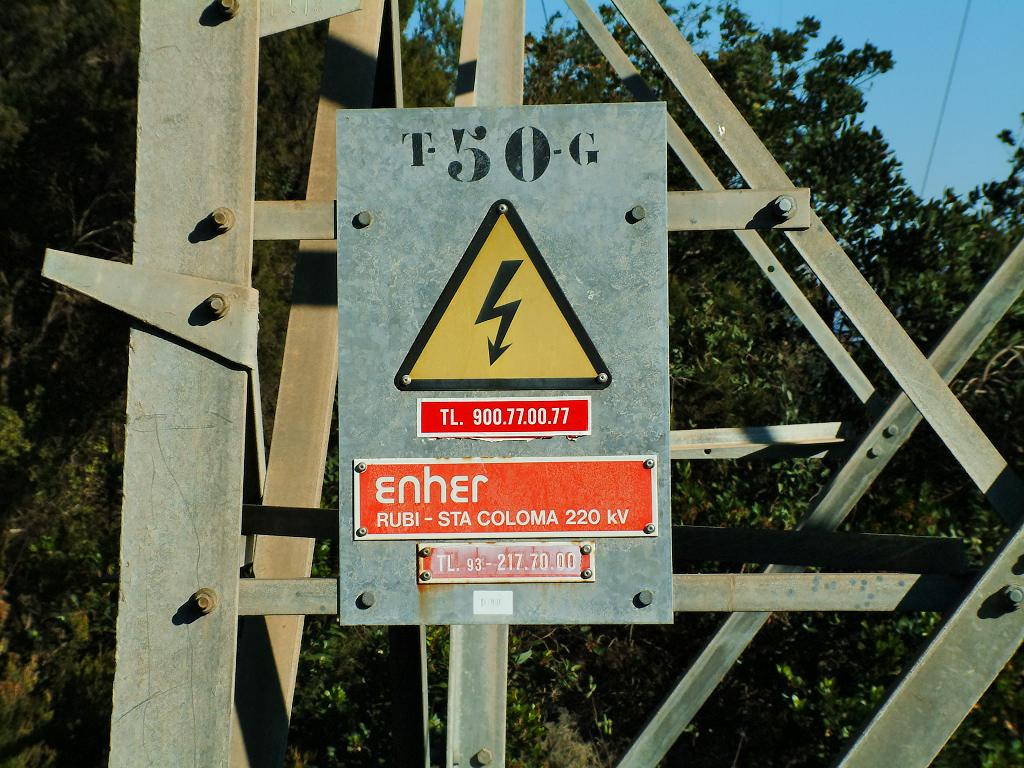 Descripción: Placa de características. Transporte AT Trayecto Rubi - Sta Coloma 220kV (Collserola - Barcelona) Fecha: 11/01/2003 Hora: 12:47 Cámara: FinePix 6900Z ISO: 100 Tv: 1/250 Av: 5 Autor: aTarom